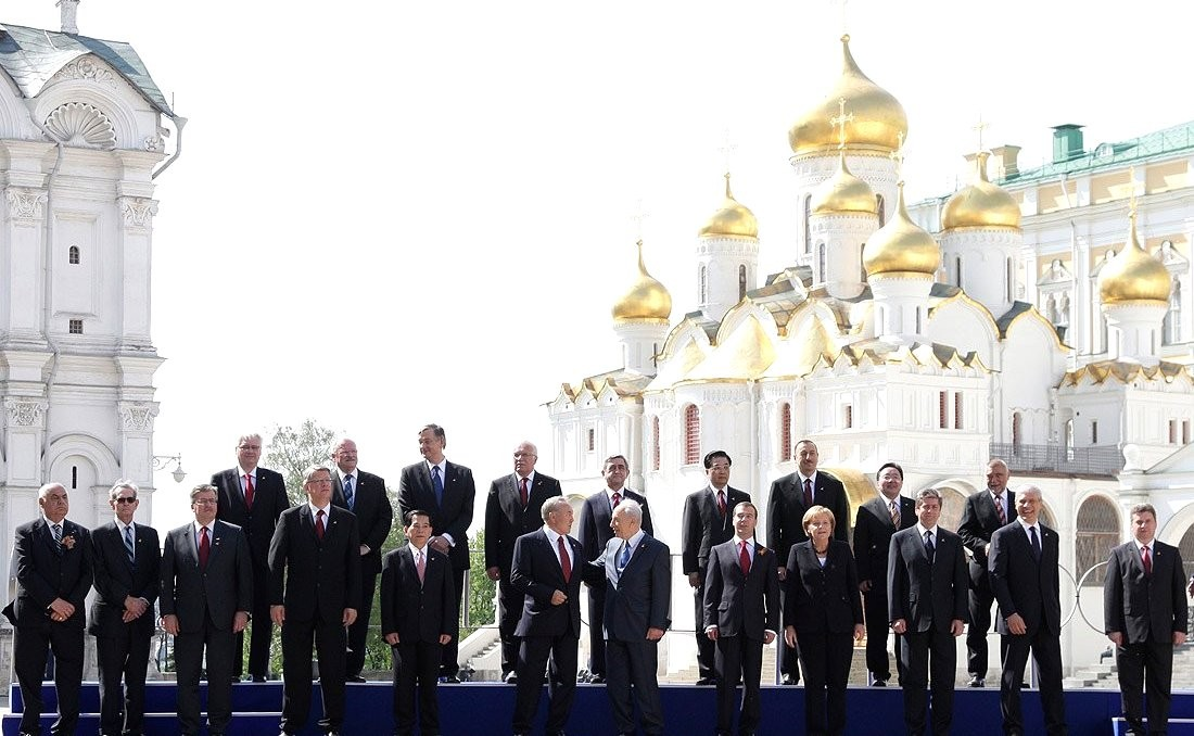 Совместное фотографирование глав иностранных государств, правительств, международных организаций и почетных гостей на Соборной площади.